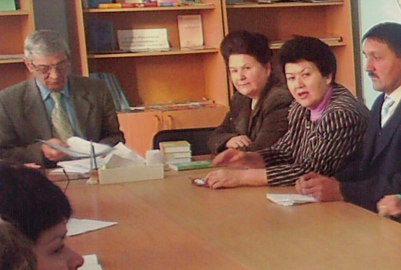 Башҡорт ҡатын-ҡыҙҙары йәмғиәте ағзалары - Нуриман районында. Ойошма рәйесе - Гүзәл Ситдиҡова. 2009